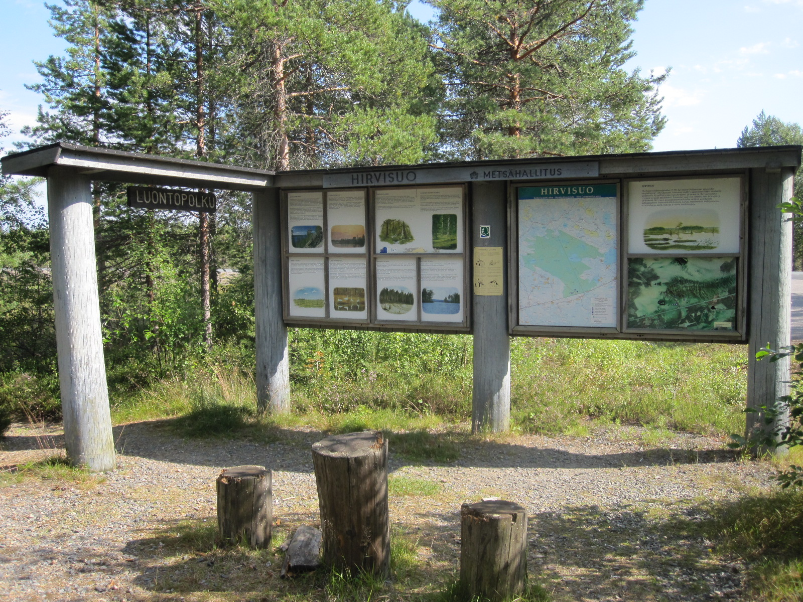 Pudasjärven ja Oulun kaupunkien rajalla, Hirvisuon soidensuojelualueella sijaitseva Hirvisuon luontopolun portti.